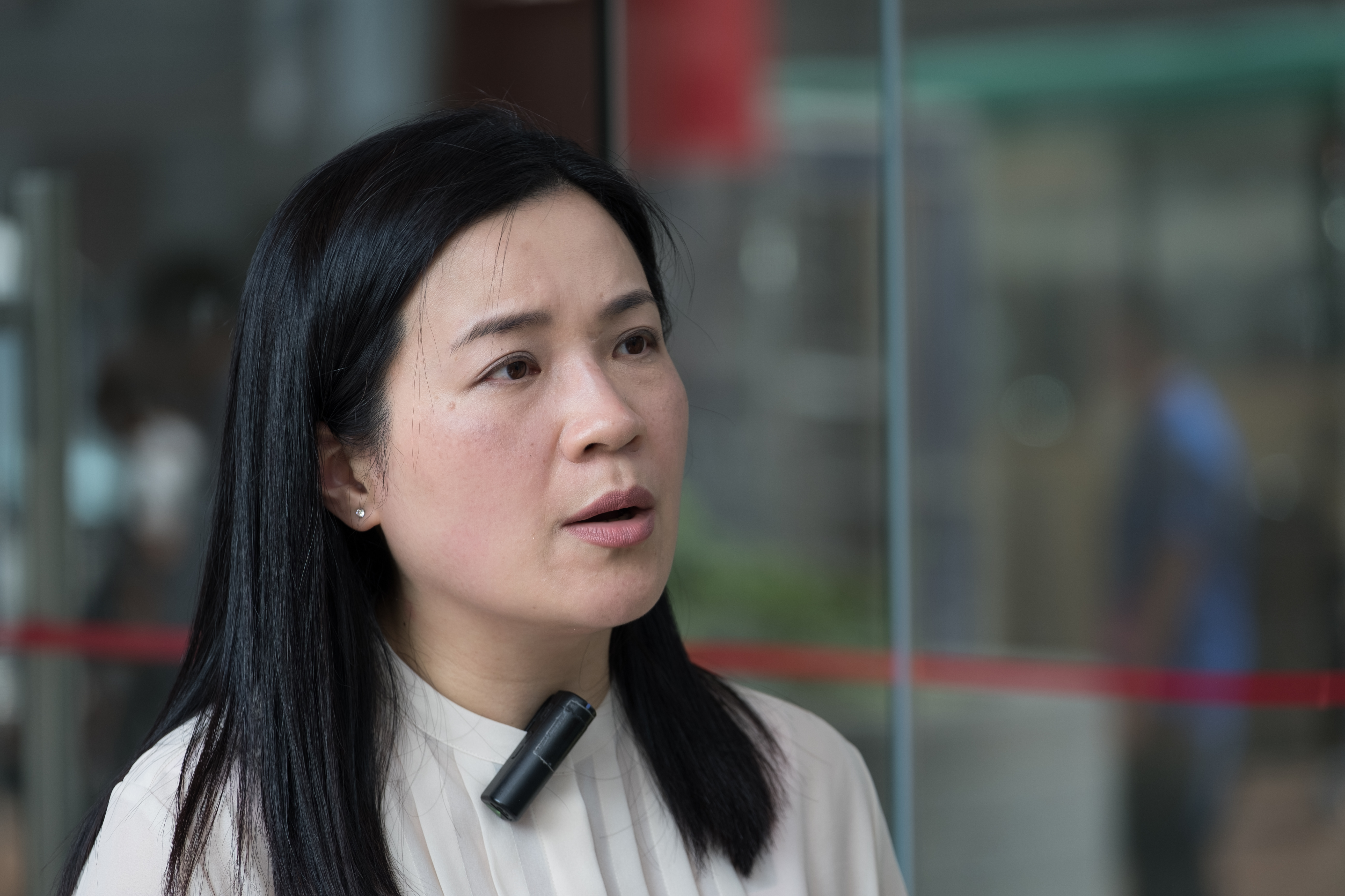 粵語: 吳敏兒